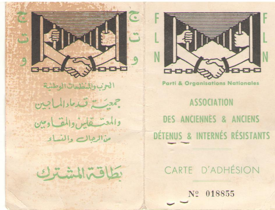 بطاقة انتسابه لجبهة التحرير الوطني